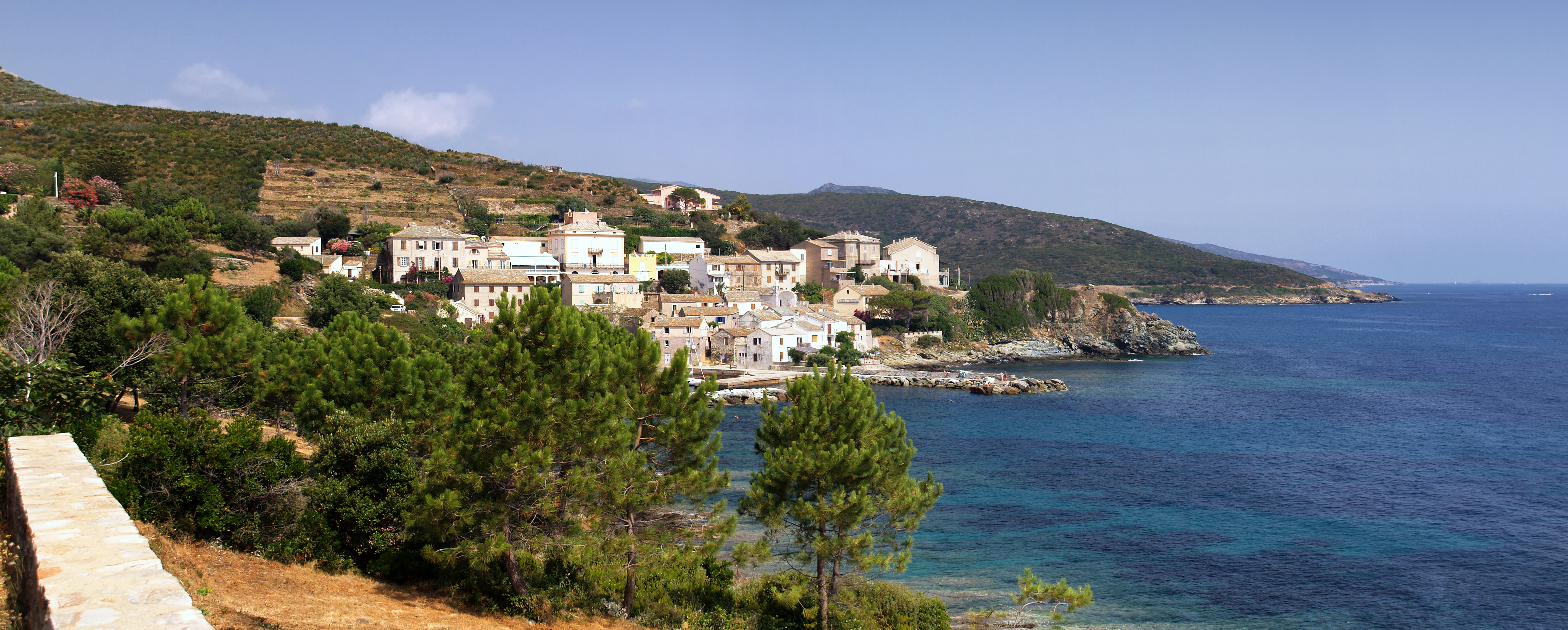 Cagnano (Corse) - Panorama de la marine de Porticciolo